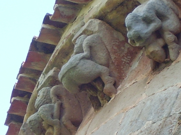 Canecillos de la Iglesia románica de Villanueva de la Nía (Cantabria) RPLl/GyR - agosto de 2006